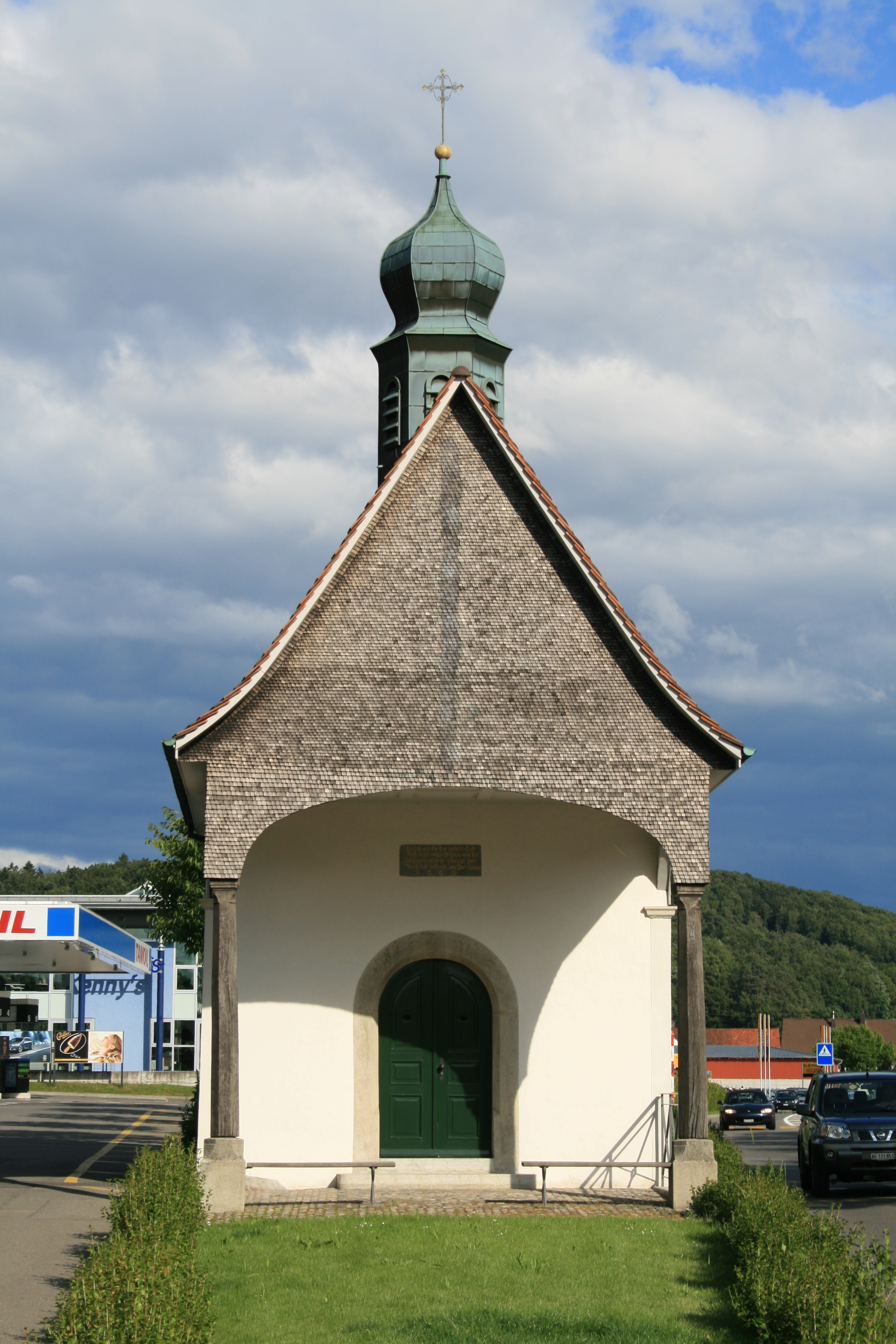 Kreuzkapelle Wettingen, Aargau, Schweiz